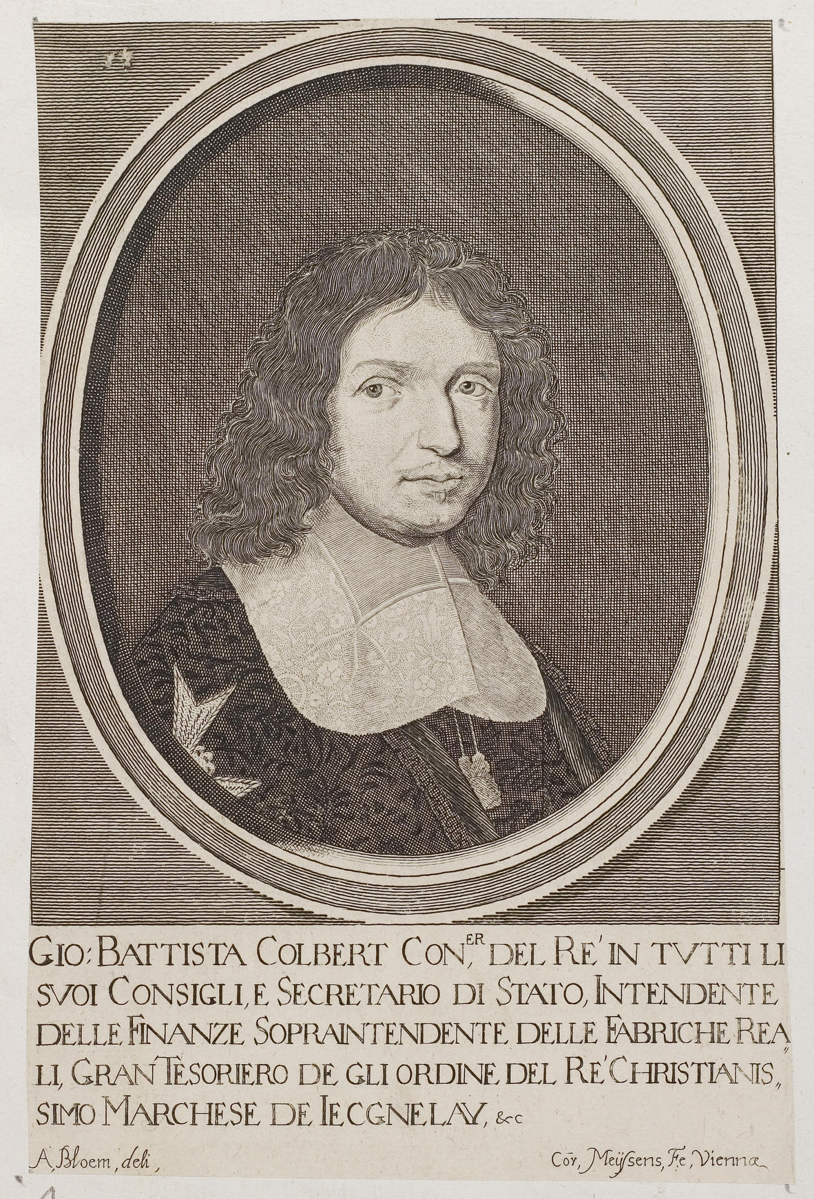 Grafik aus dem Klebeband Nr. 2 der Fürstlich Waldeckschen Hofbibliothek Arolsen Motiv: Jean-Baptiste Colbert, französischer Staatsmann und der Begründer des Merkantilismus (Colbertismus)